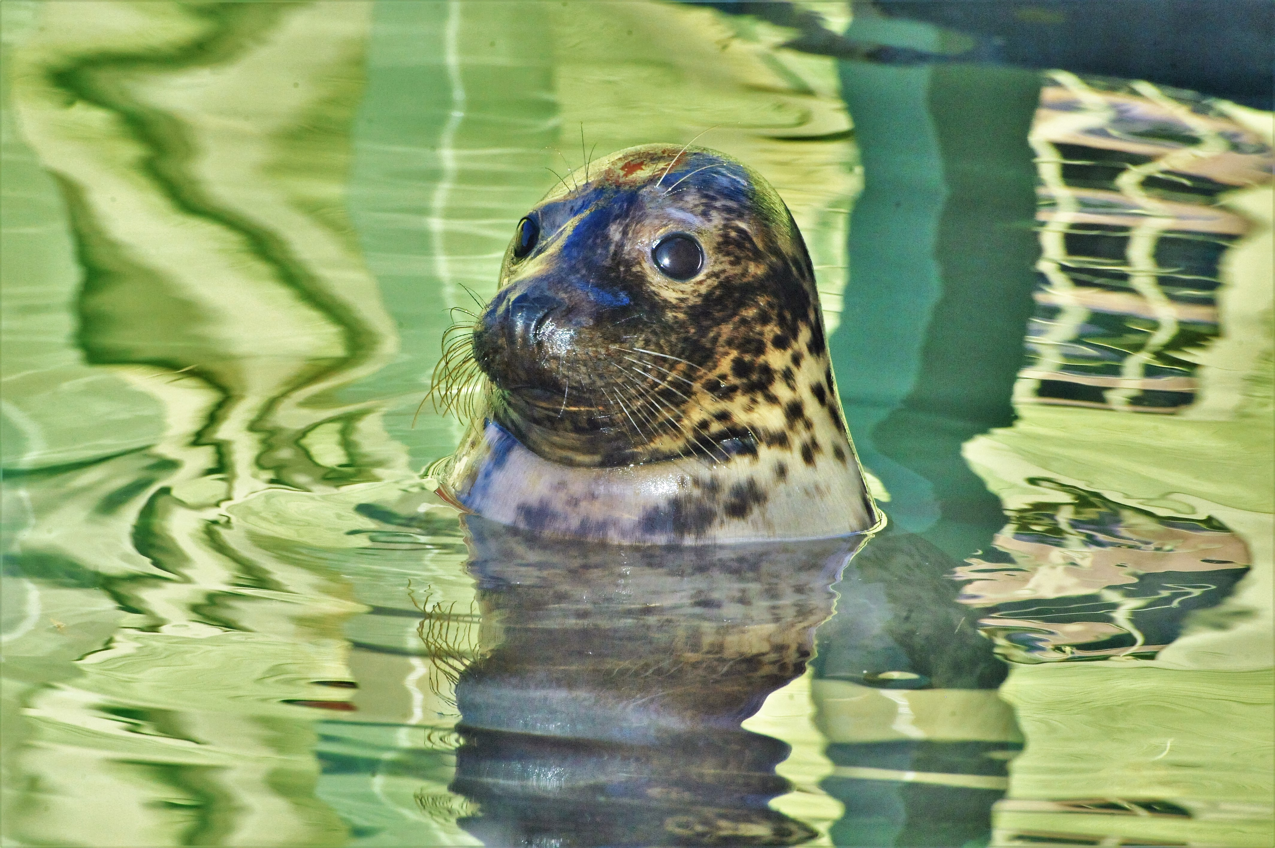 серый тюлень